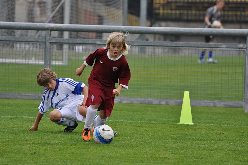 dtfhzm